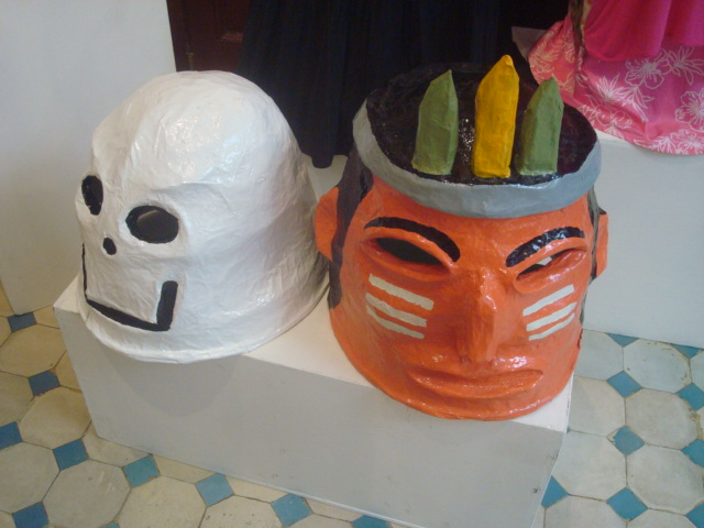 Máscaras artesanales de Costa Rica.